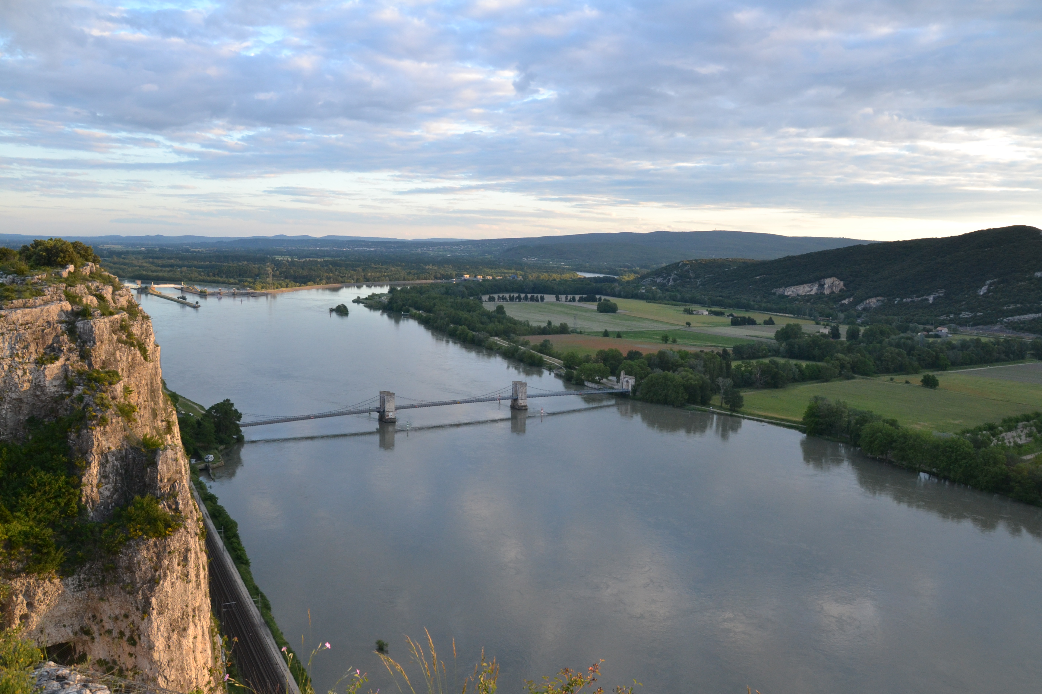 Le pont du Robinet sur le Rhône près de Donzère (Drôme, France). Au fond, le canal de Donzère-Mondragon.